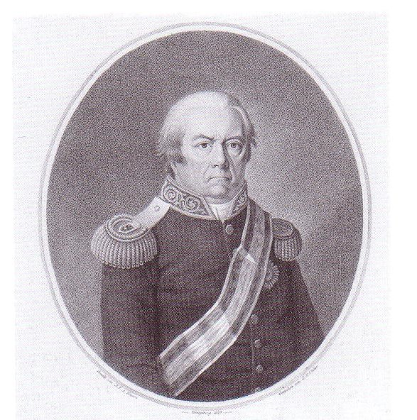 Porträt von Karl Wilhelm von Schrötter (1748-1819)